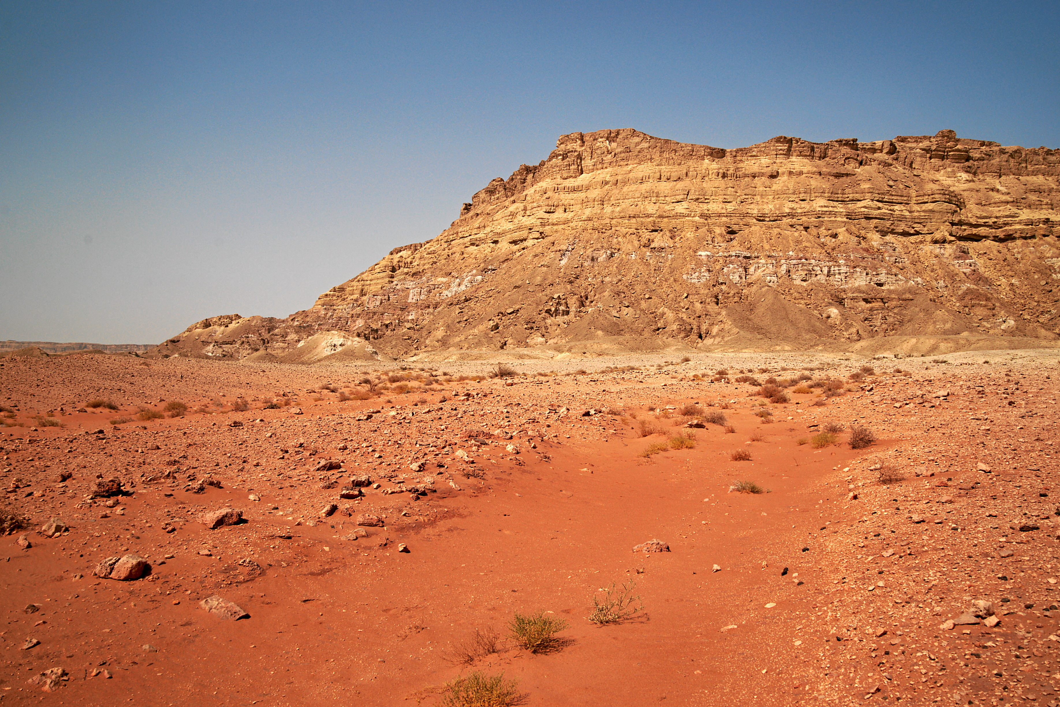 Blick zum Mount Ardon